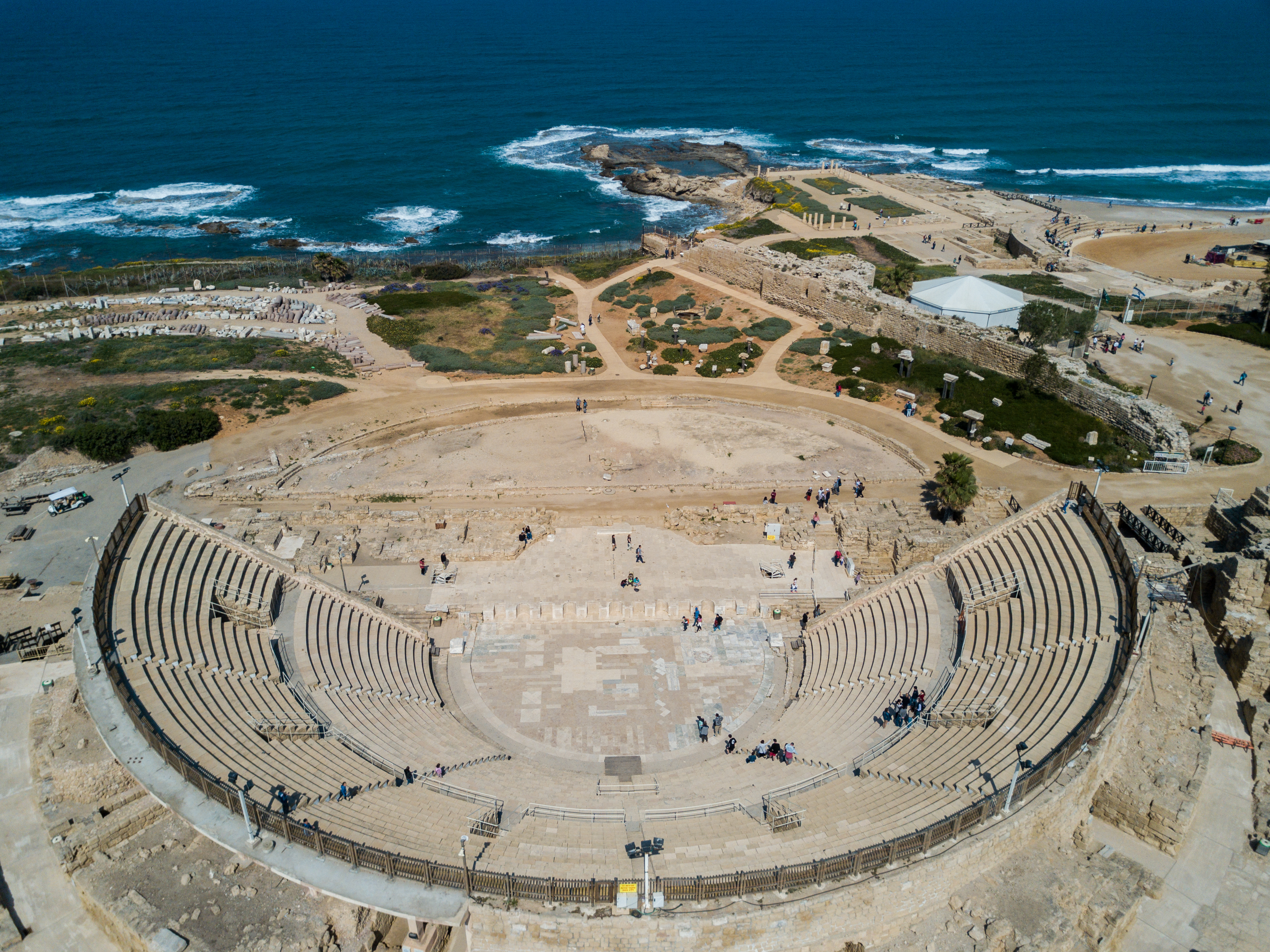 קיסריה היא עיר נמל שהוקמה בשנים 13-25 של לפנה"ס. היא שימשה כבירת ארץ ישראל בתקופה הרומית, ונקראה על שם אוגוסטוס קיסר. כיום העיר העתיקה היא גן לאומי ולידה הוקמה קיסריה המודרנית.